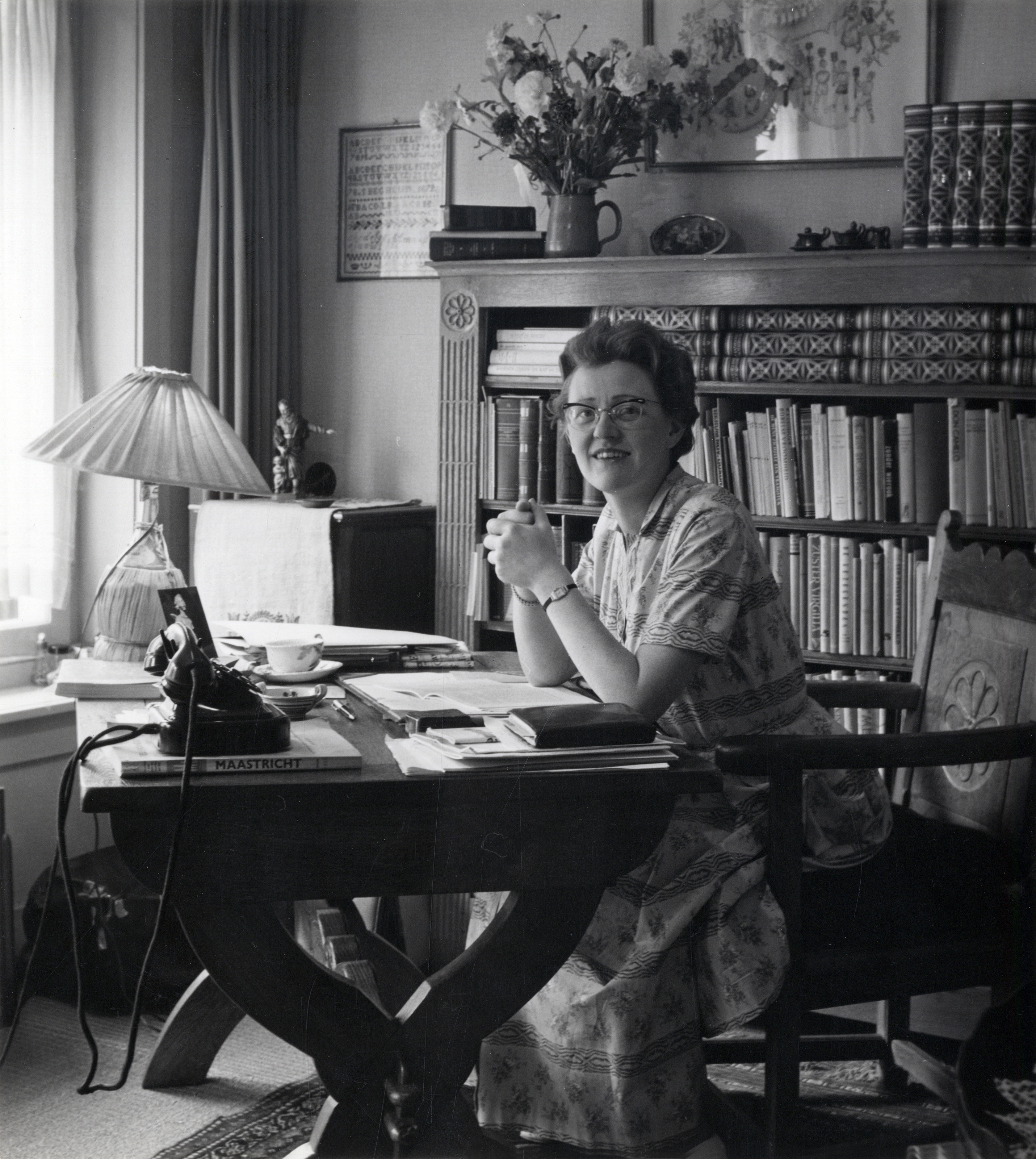 Mevrouw G.S.H.M. (Truus) Kok (KVP) aan haar werktafel. Nederland, Hoensbroek, datum onbekend.